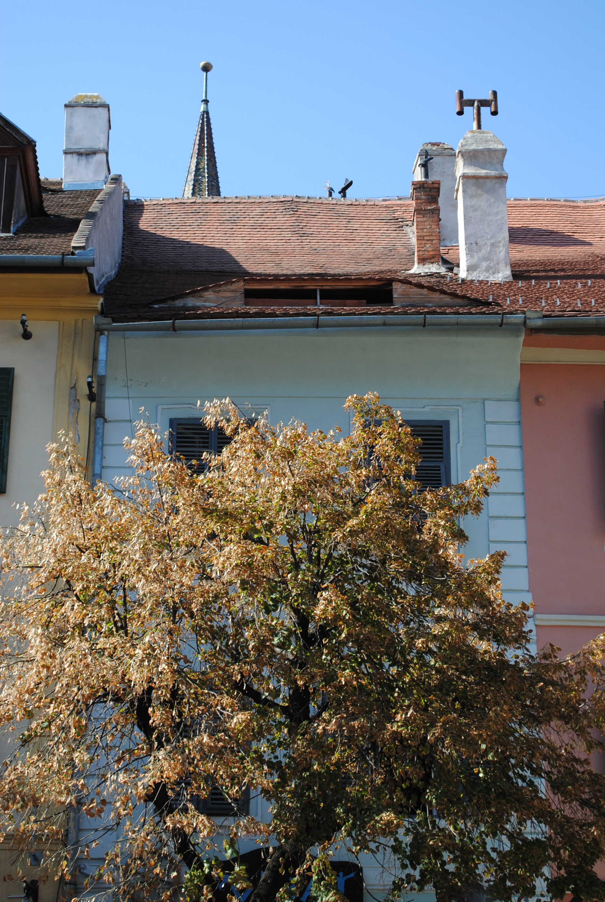 Casă, sec. XV - XVI, sf. XVIII